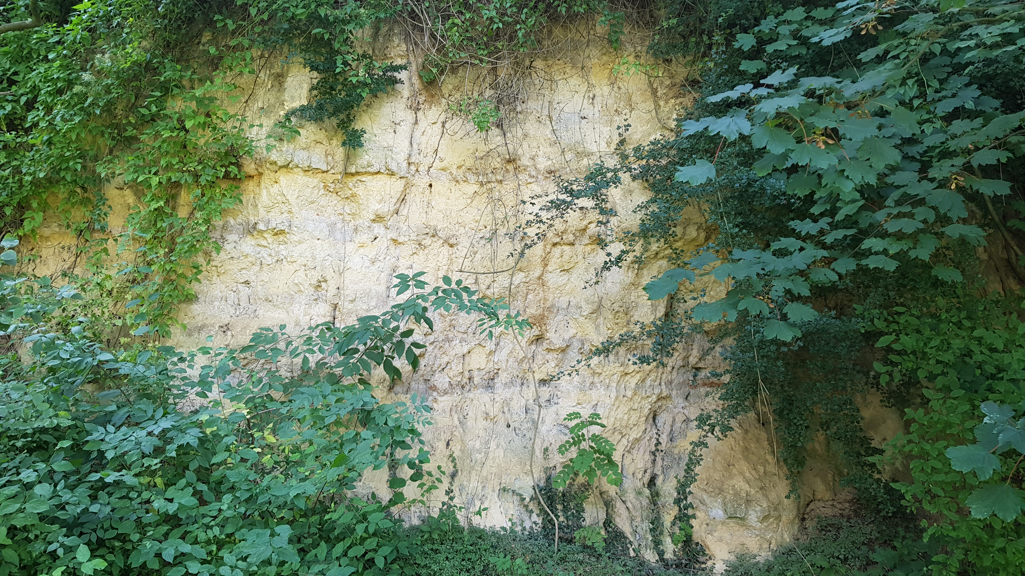 Geologisch monument Groeve Midweg, Voerendaal, Limburg, Nederland